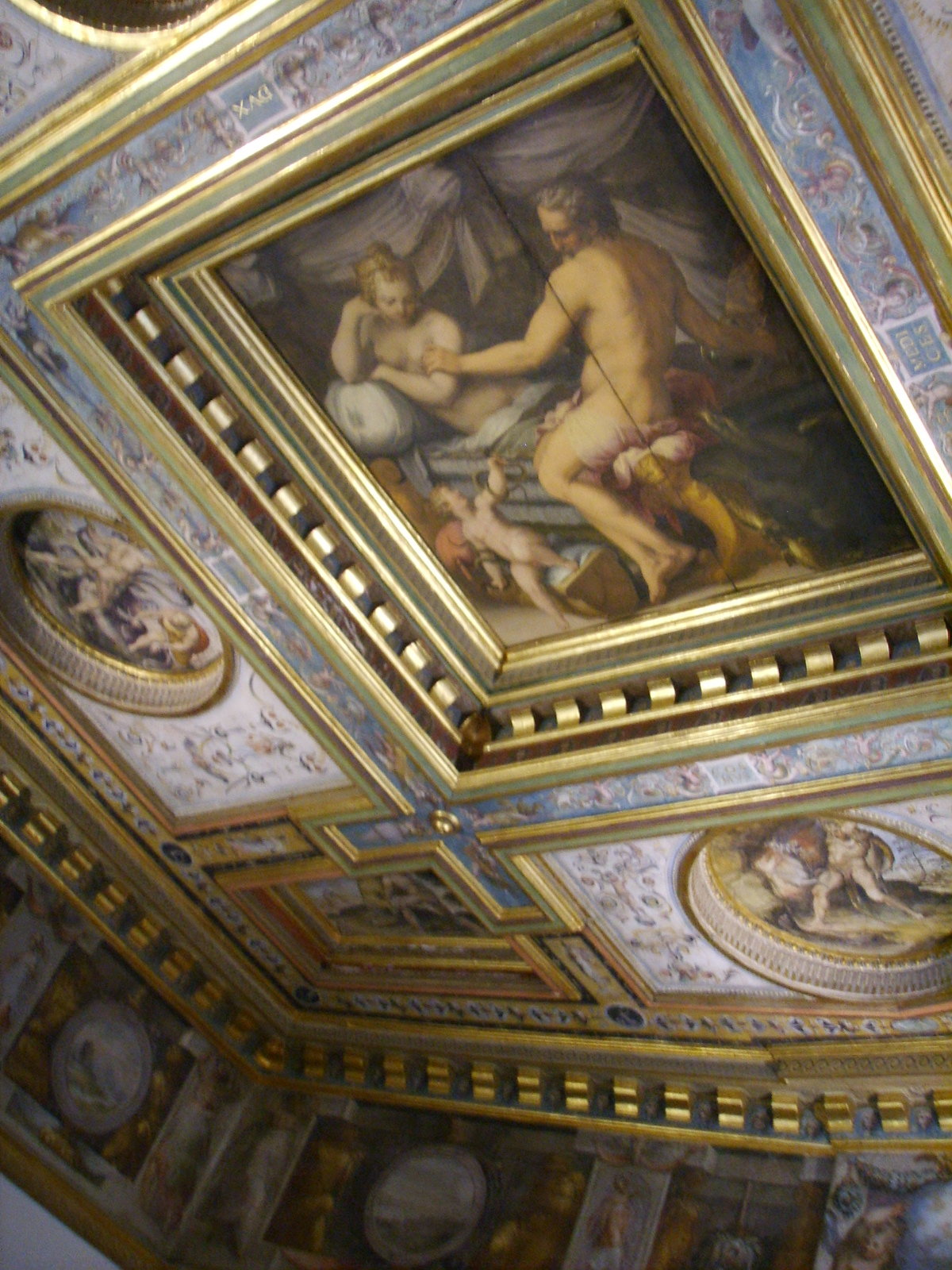 Sala di ercole, ercole lotta con i serpenti